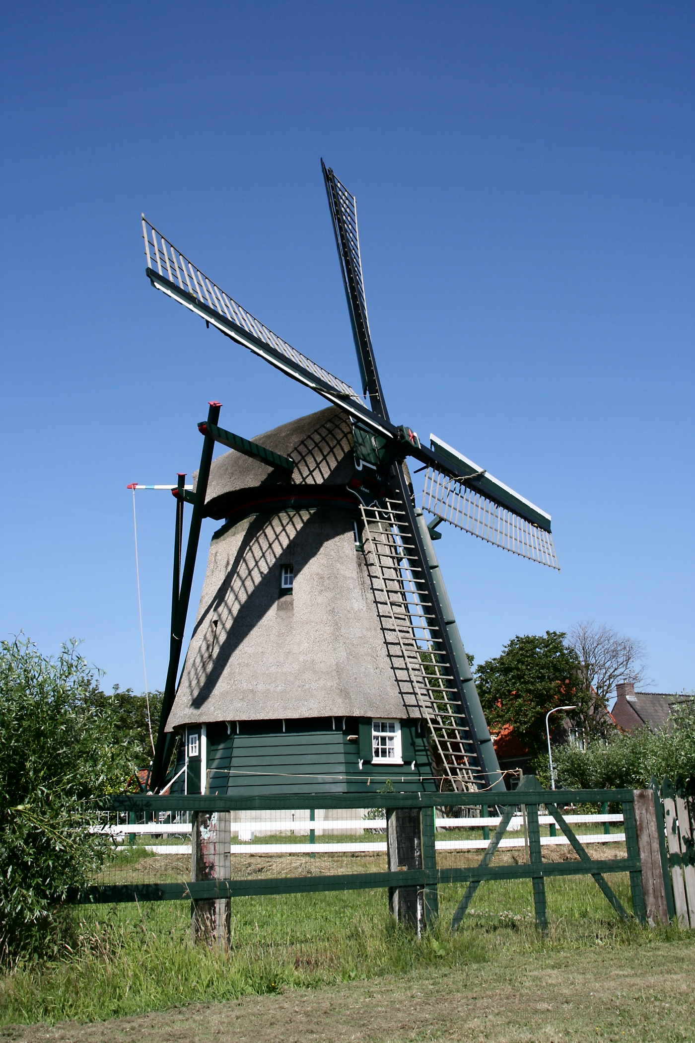 Haarlem: molen De Veer